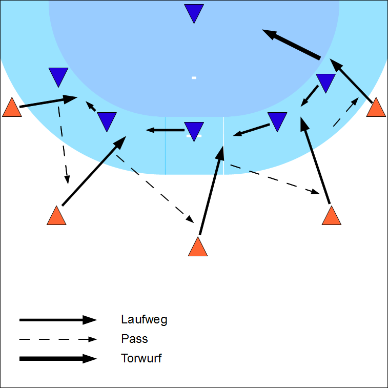 Prinzip des Parallelstosses von links mit Stossrichtung Innen. Zur Verbesserung der Übersichtlichkeit wurde auf die Darstellung des Kreisläufers verzichtet.